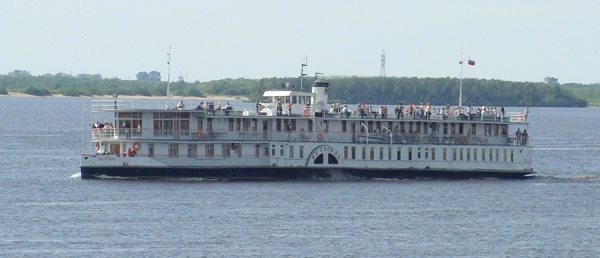 Пароход Н. В. Гоголь на причале в морском порту Архангельска